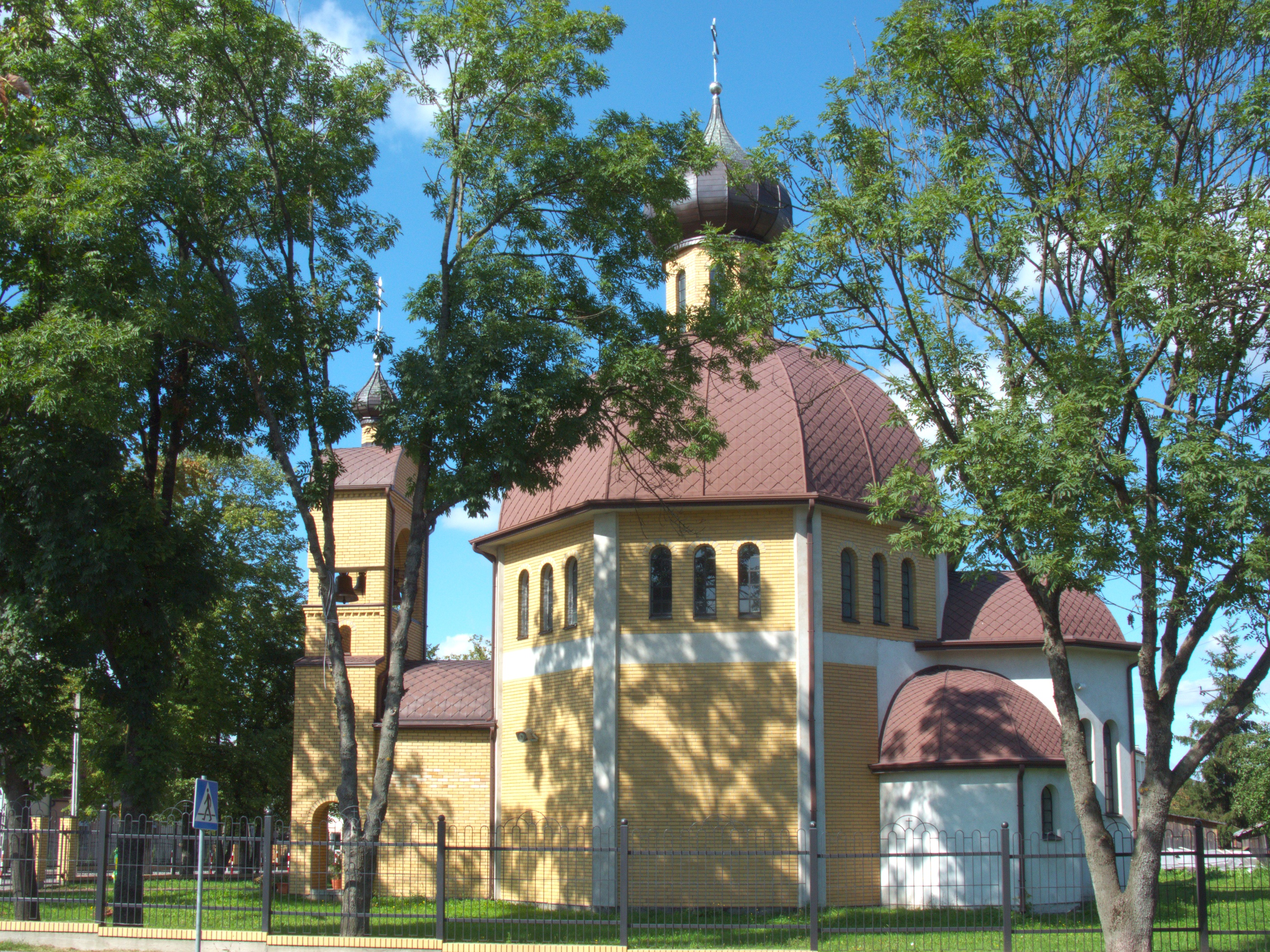 Cerkiew św. Symeona Słupnika w Brańsku.